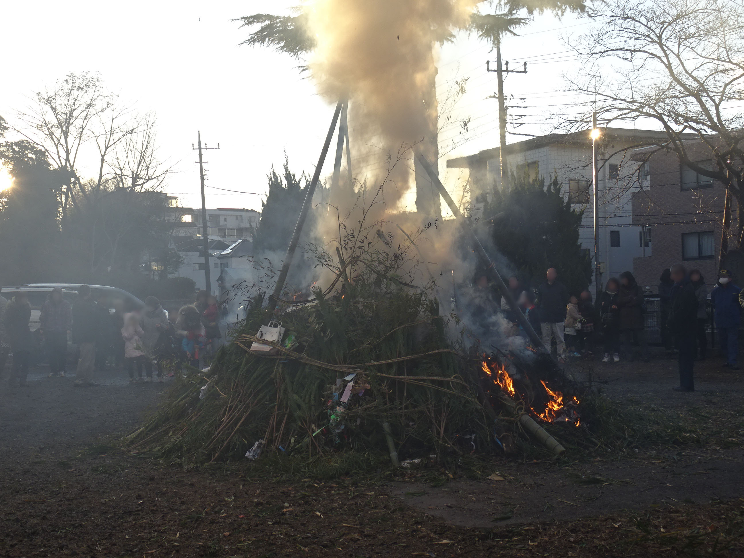 多摩市にある諏訪神社のどんど焼き（2014/01/17撮影）